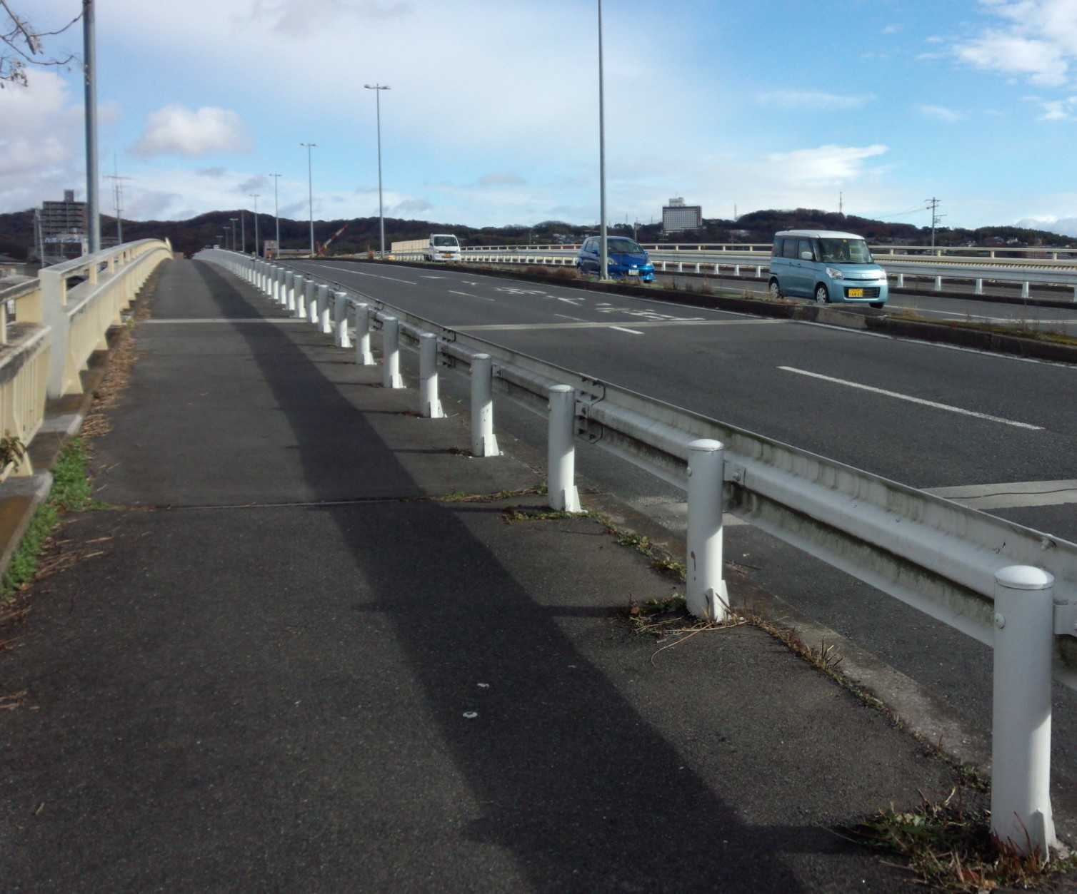 岡山市にある新京橋（橋上）